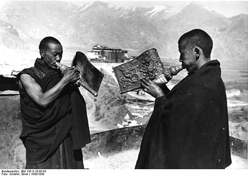 Lhasa, Lamas blasen Muscheltrompeten